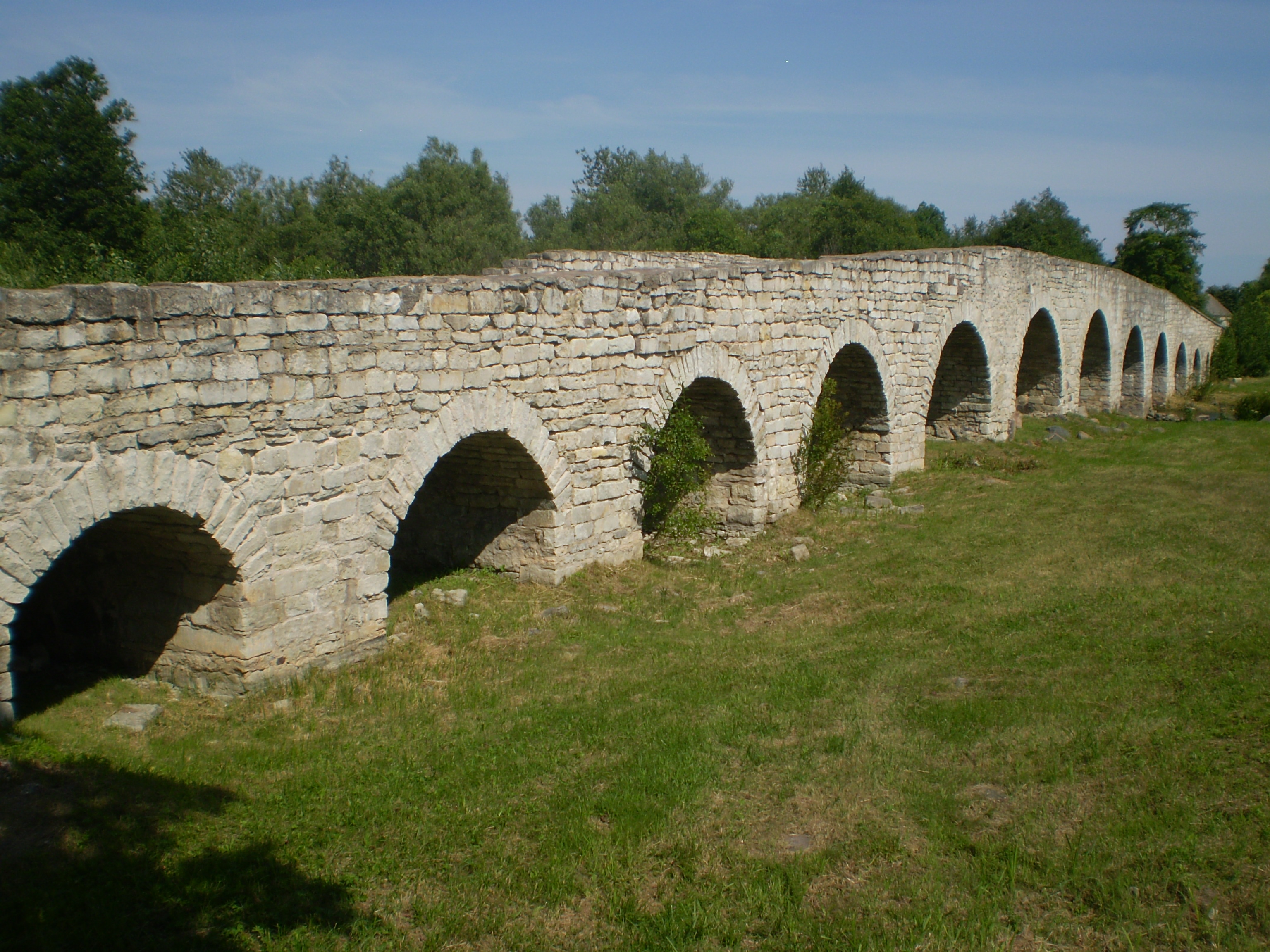 Kuressaare suursild